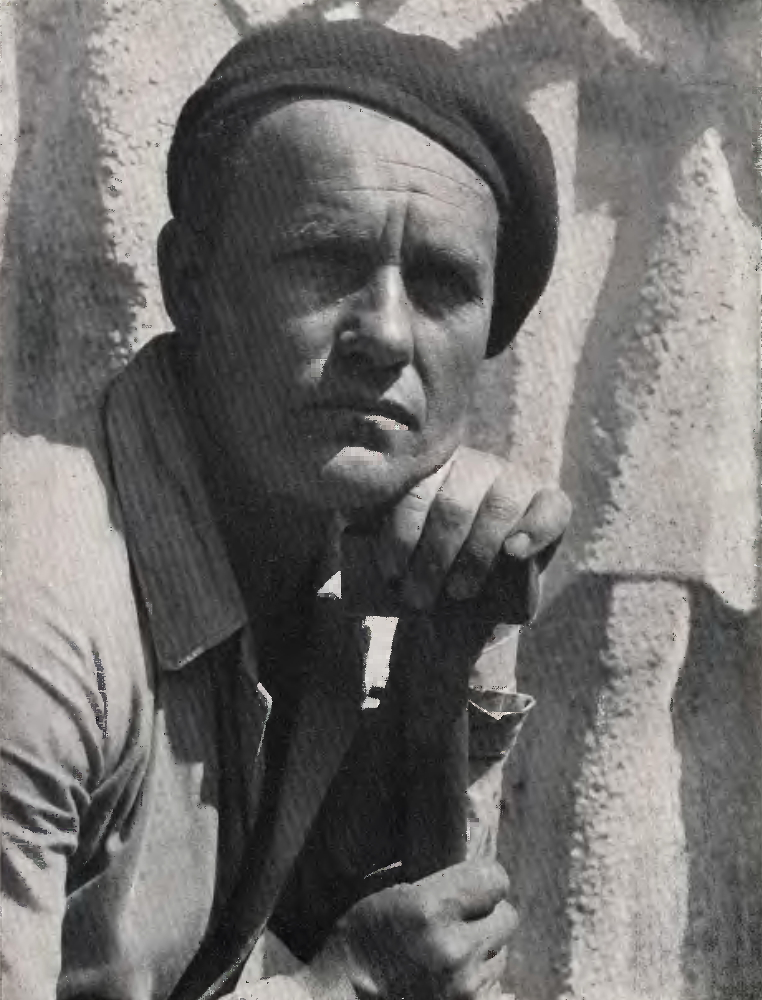 Porträtfoto des Künstlers Thomas Myrtek (1888–1935). Fotografiert von Max Glauer (1867–1935), Oppeln.